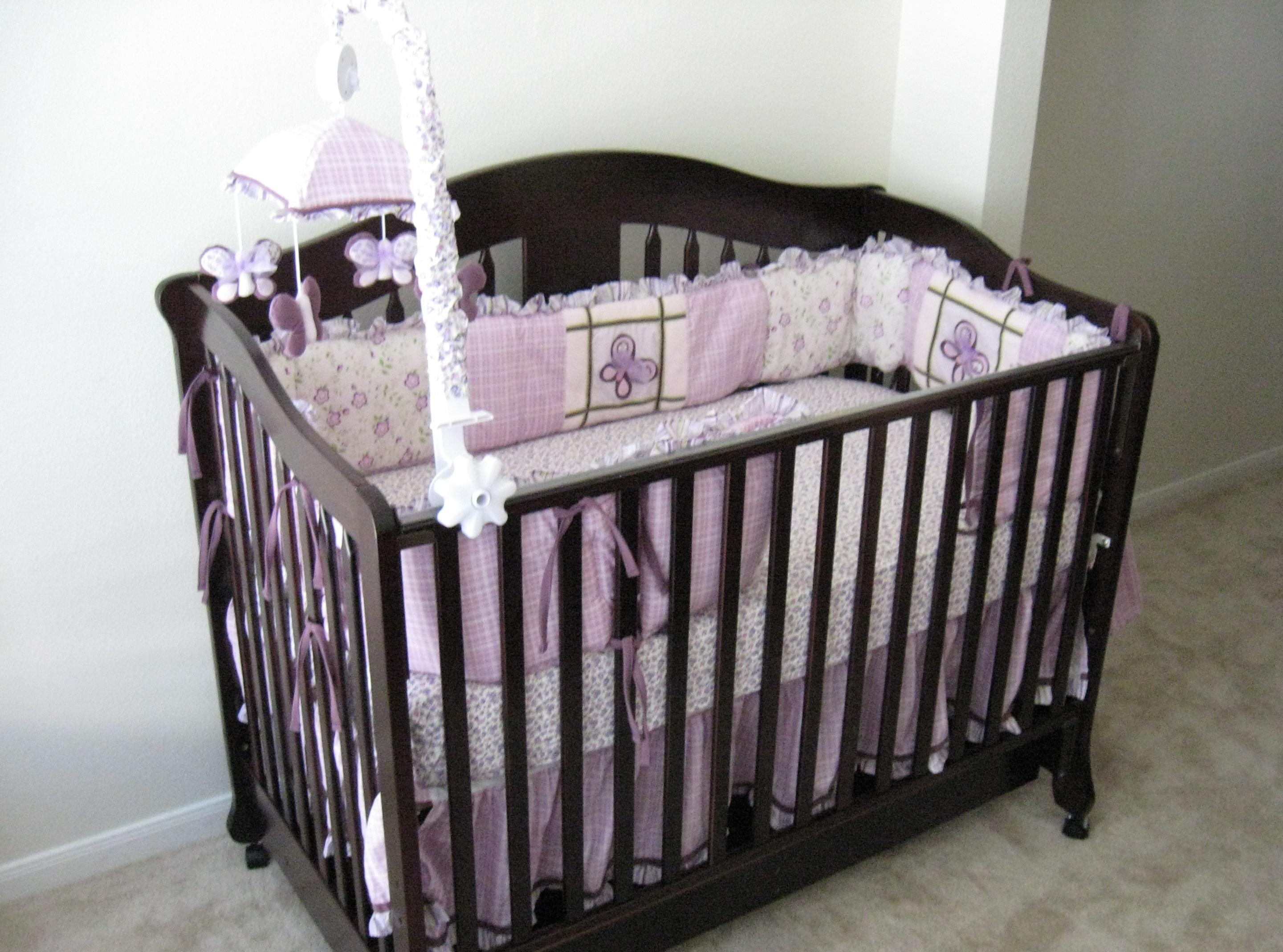 Дечији креветац.